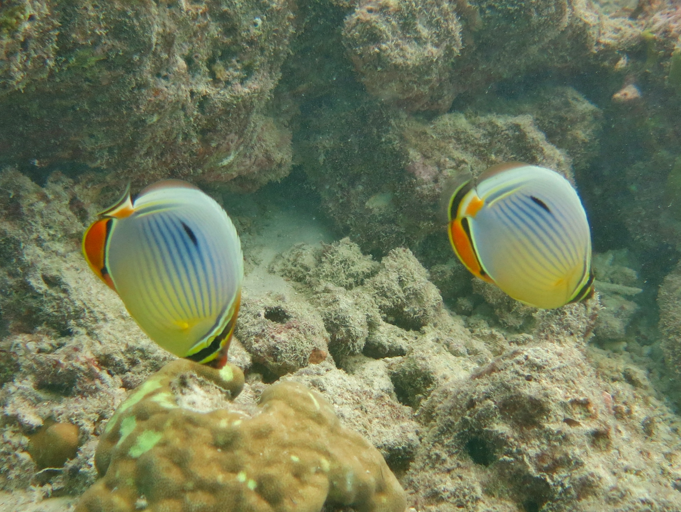 Un couple de poissons-papillons à trois bandes (Chaetodon trifasciatus) aux Maldives (Landaagiraavaru, atoll de Baa).